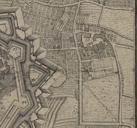 Extrait du plan Bibliothèque nationale de France, département Cartes et plans, GE D-14510